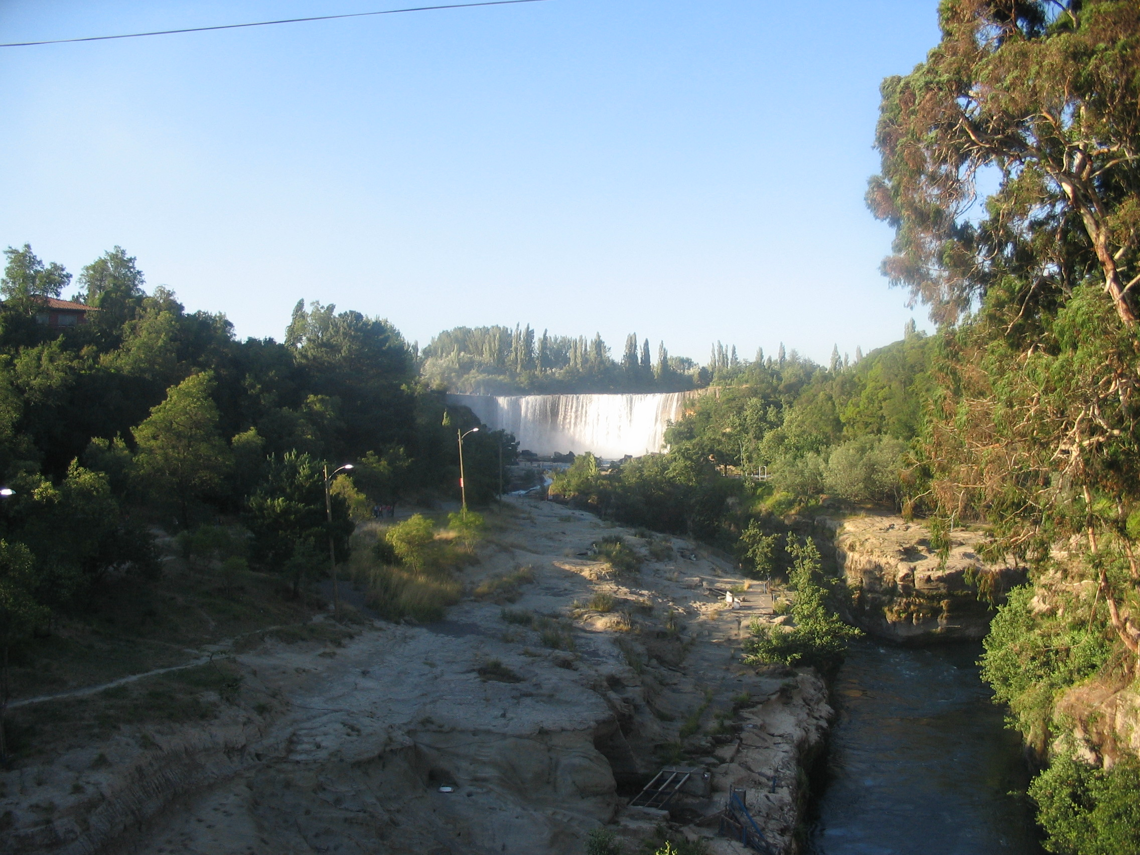 Salto del LAja Chile, desde el Puente ex ruta 5